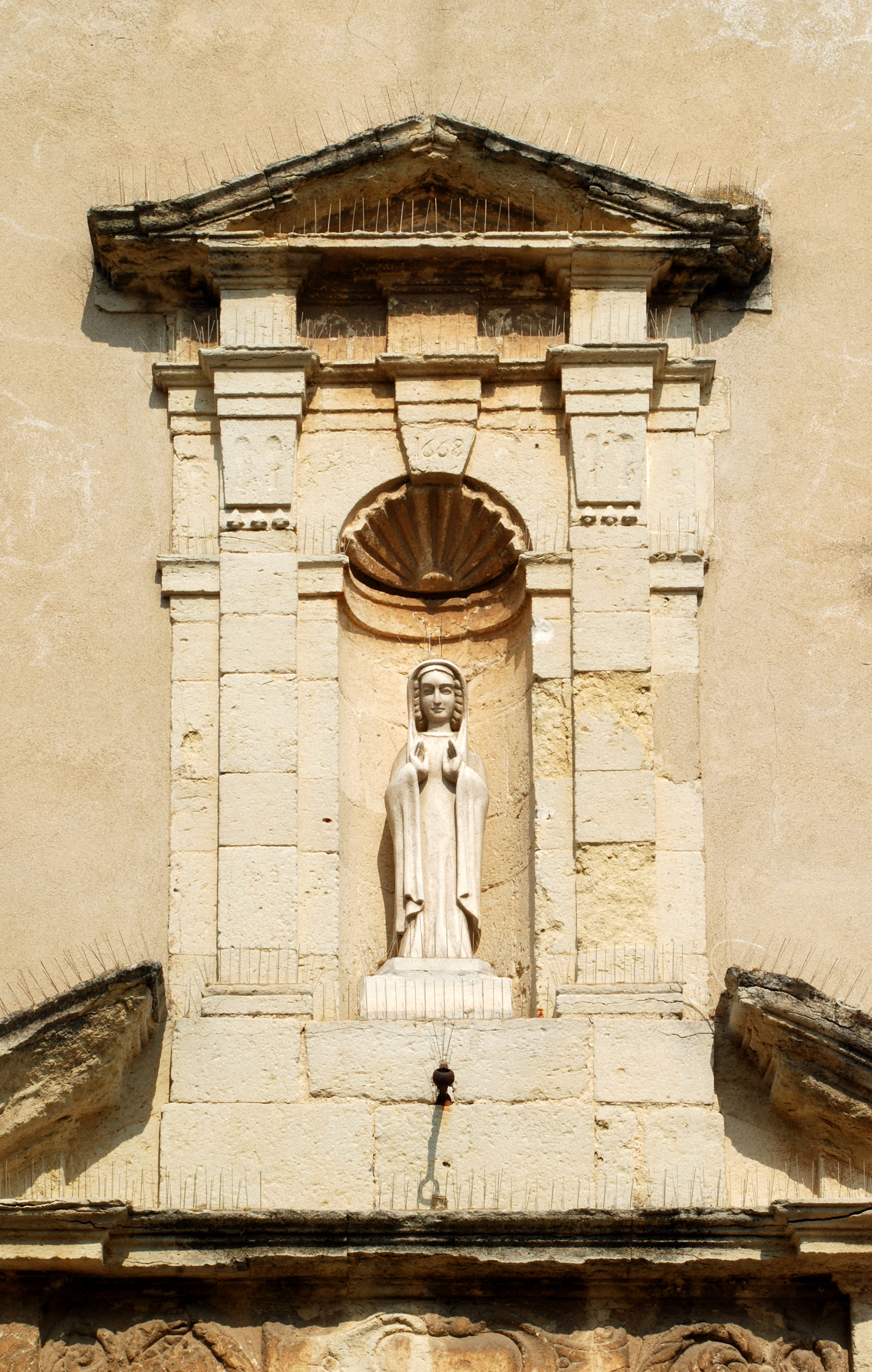 France - Gard - Église de Saint-Césaire-lès-Nîmes